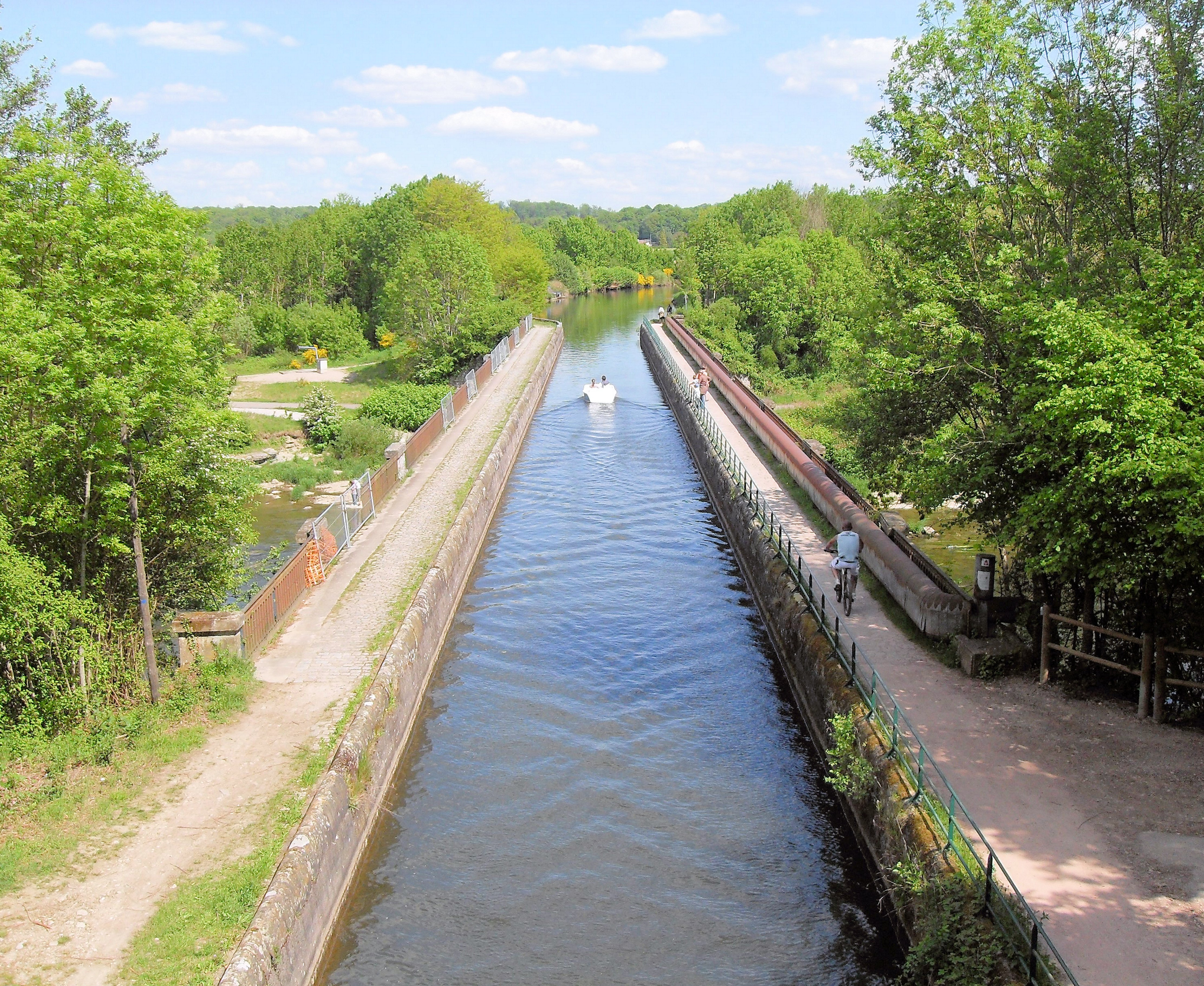 Branche d'Épinal (Canal des Vosges), pont-canal sur la Moselle à Golbey